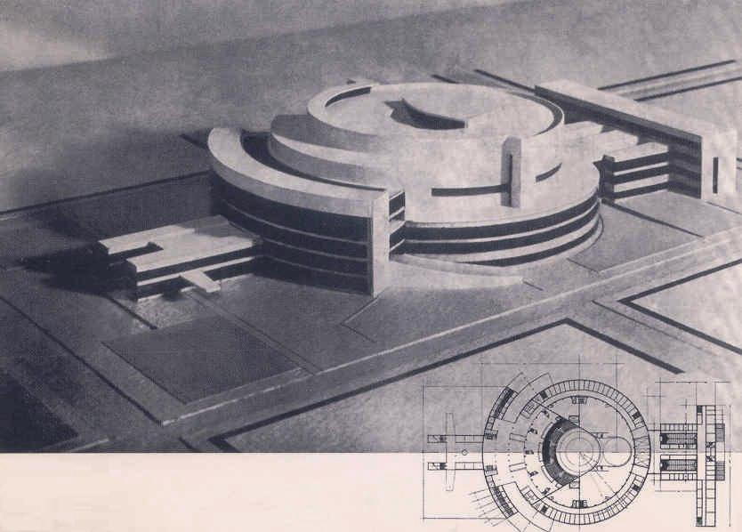 Zdenko Strižić- Natječajni projekt kazališta u Harkovu 1930.jpg